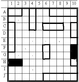 Schema eines Planes zum Spiel Schiffe versenken